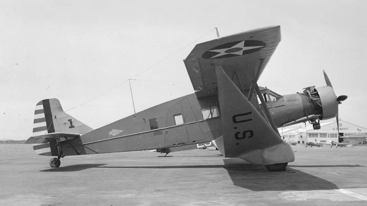 BellancaC27c